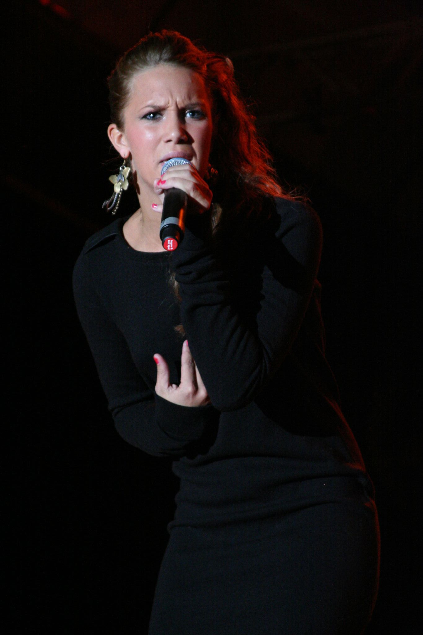 Agnes Carlsson performing live during SR Festival at Kungsträdgården in Stockholm